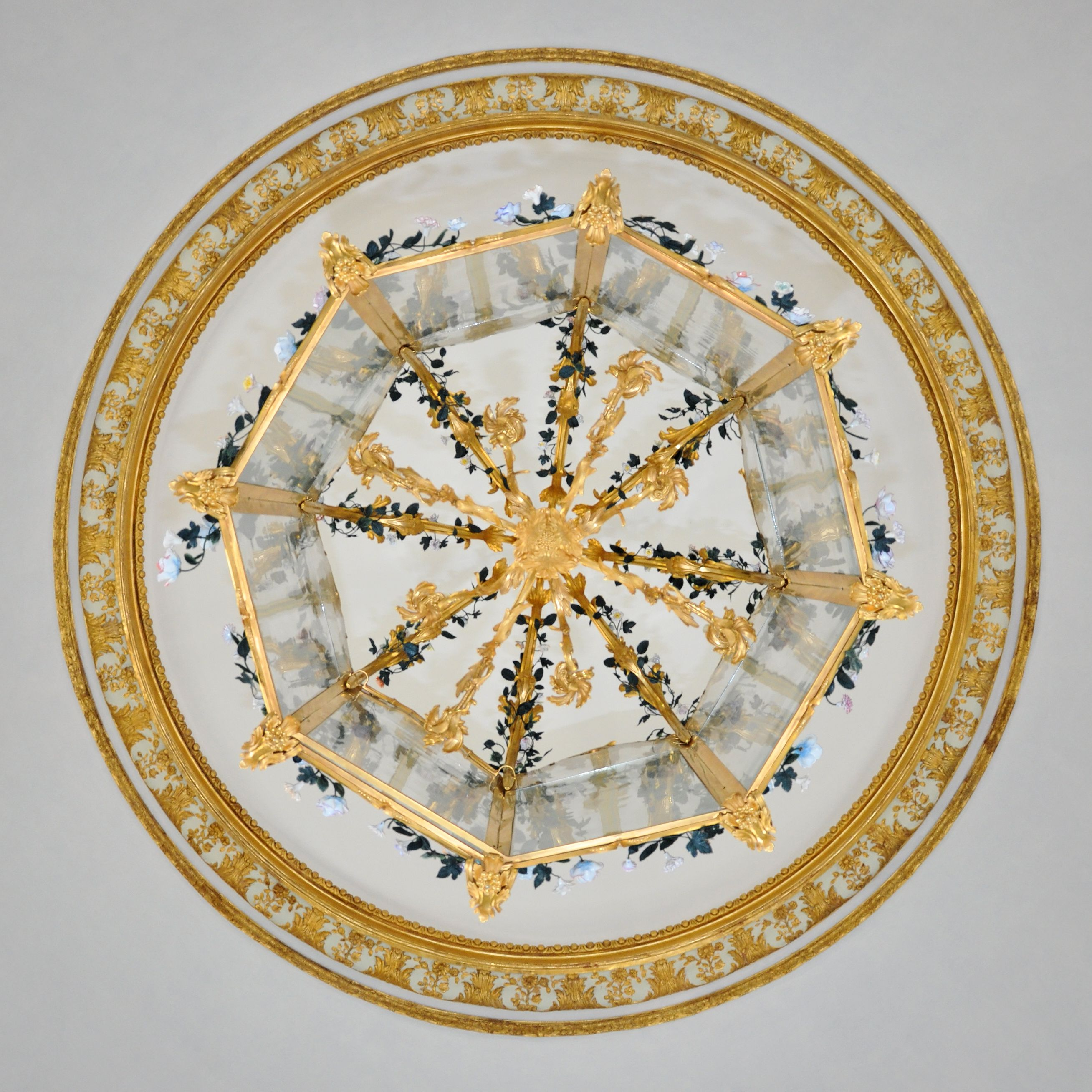 Petit Trianon - Pavillon français - Plafond et lustre